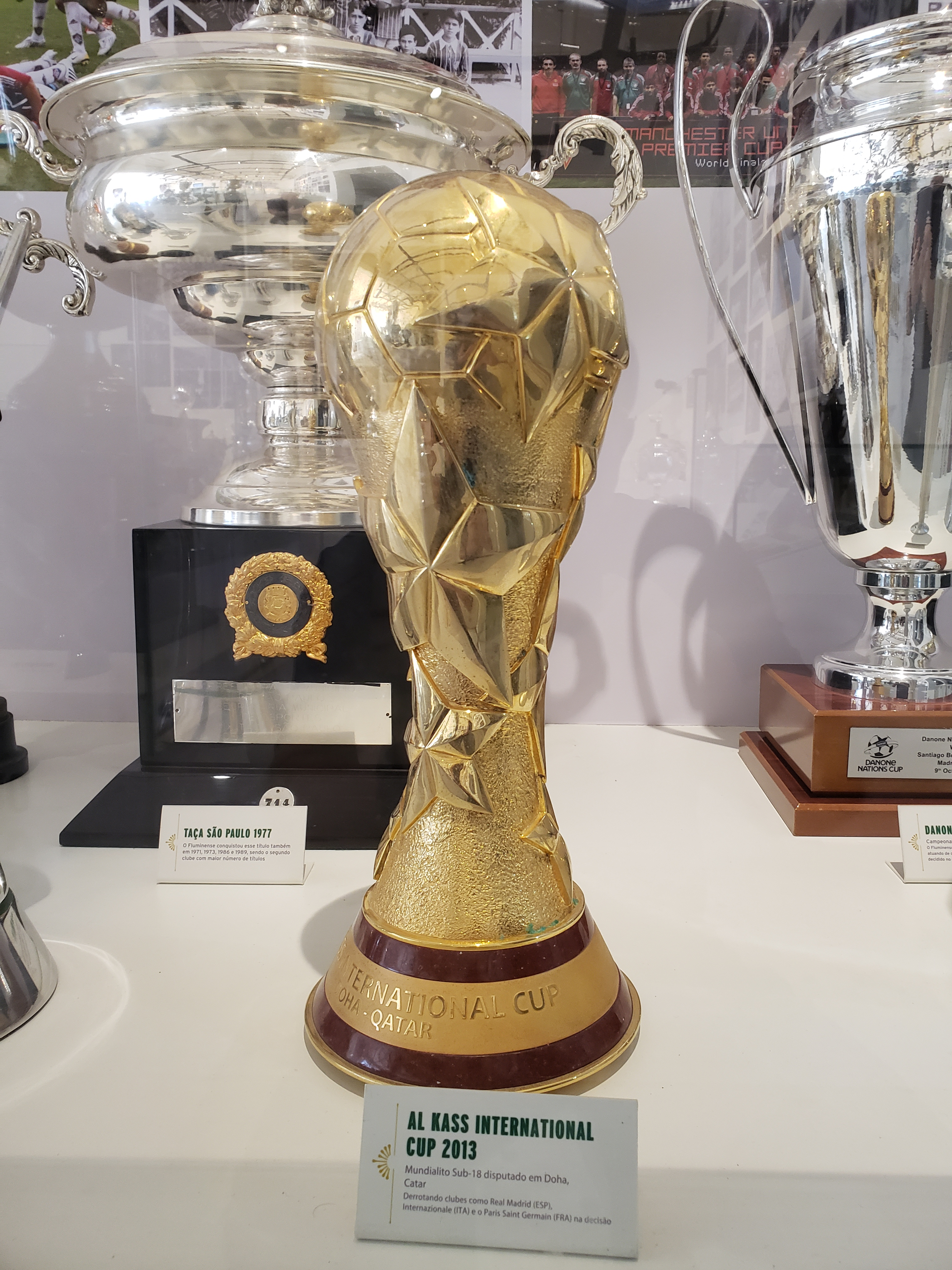 Al Kass International Cup Sub-17 2013 conquistada pelo Fluminense Football Club.